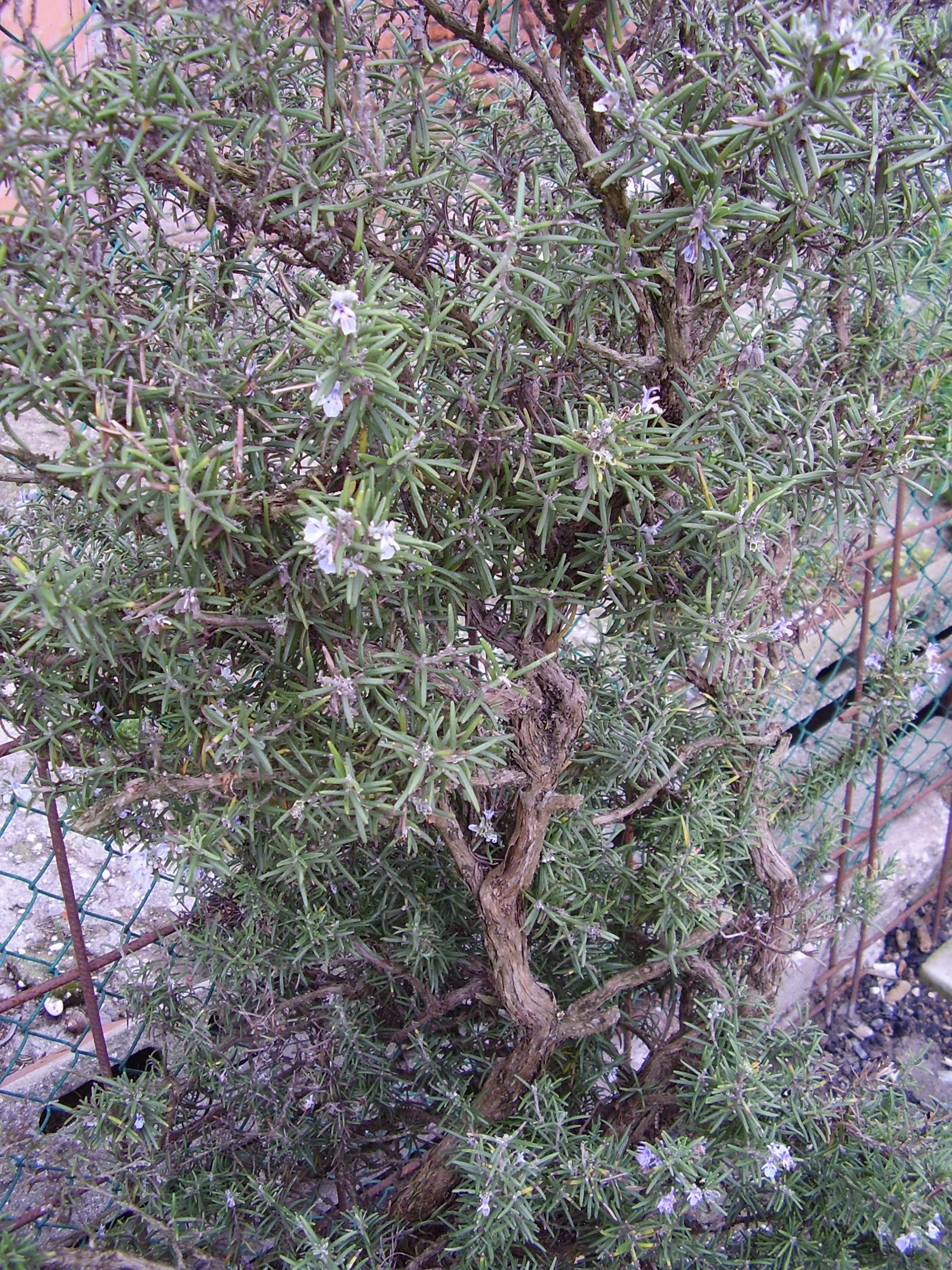 Rosmarinus officinalis (rosmarino).